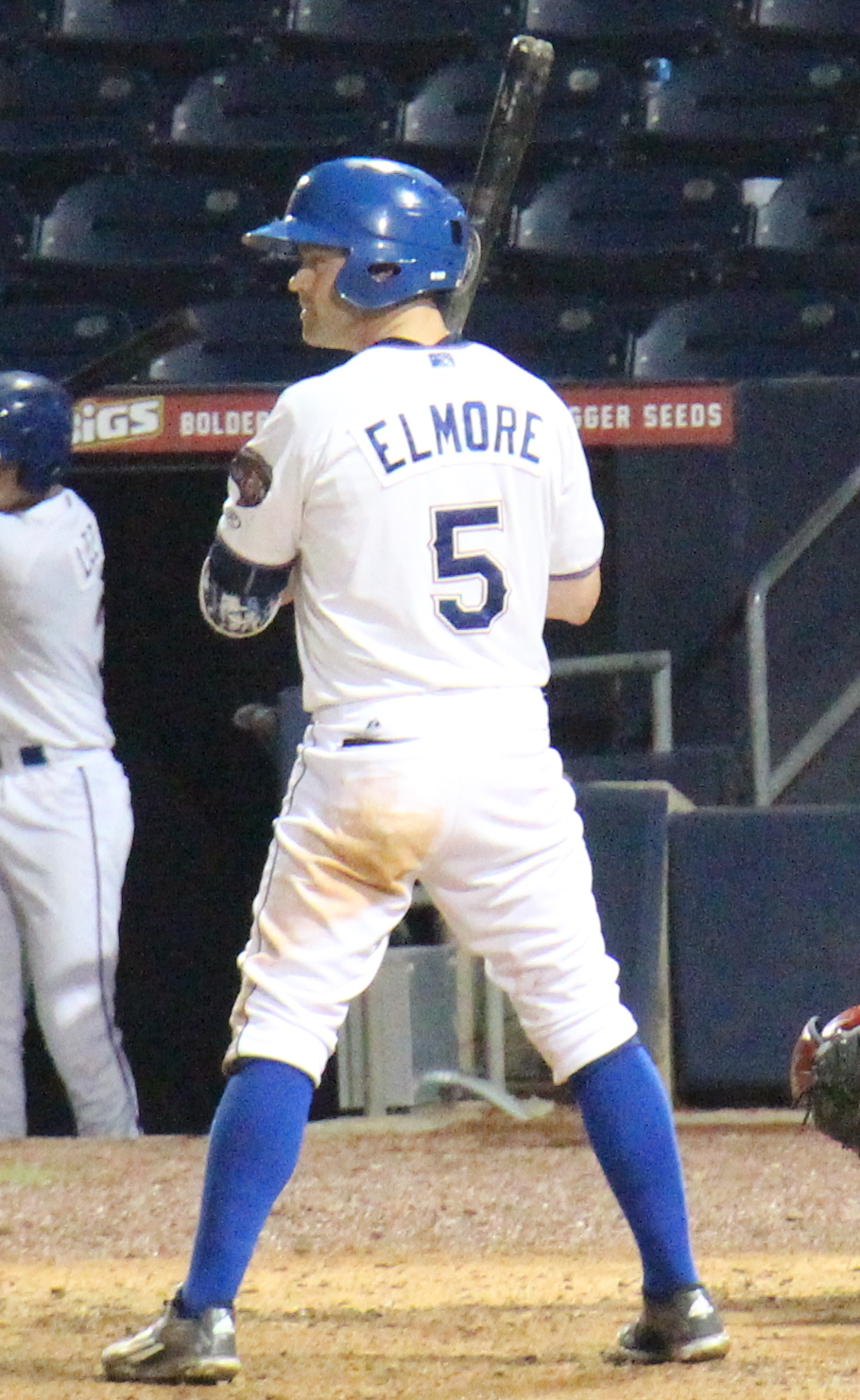 Jake Elmore